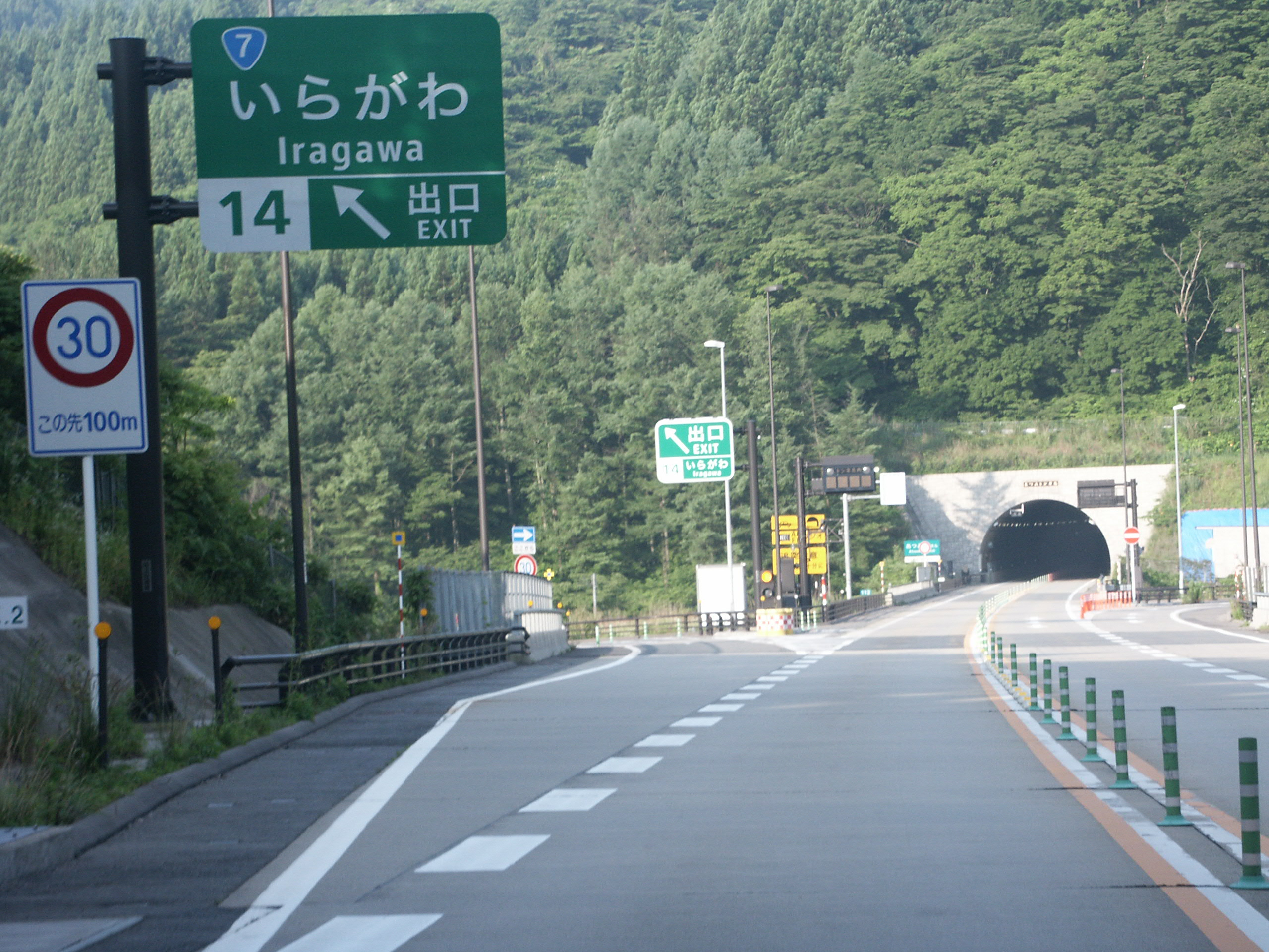 日本海東北自動車道いらがわIC出口付近